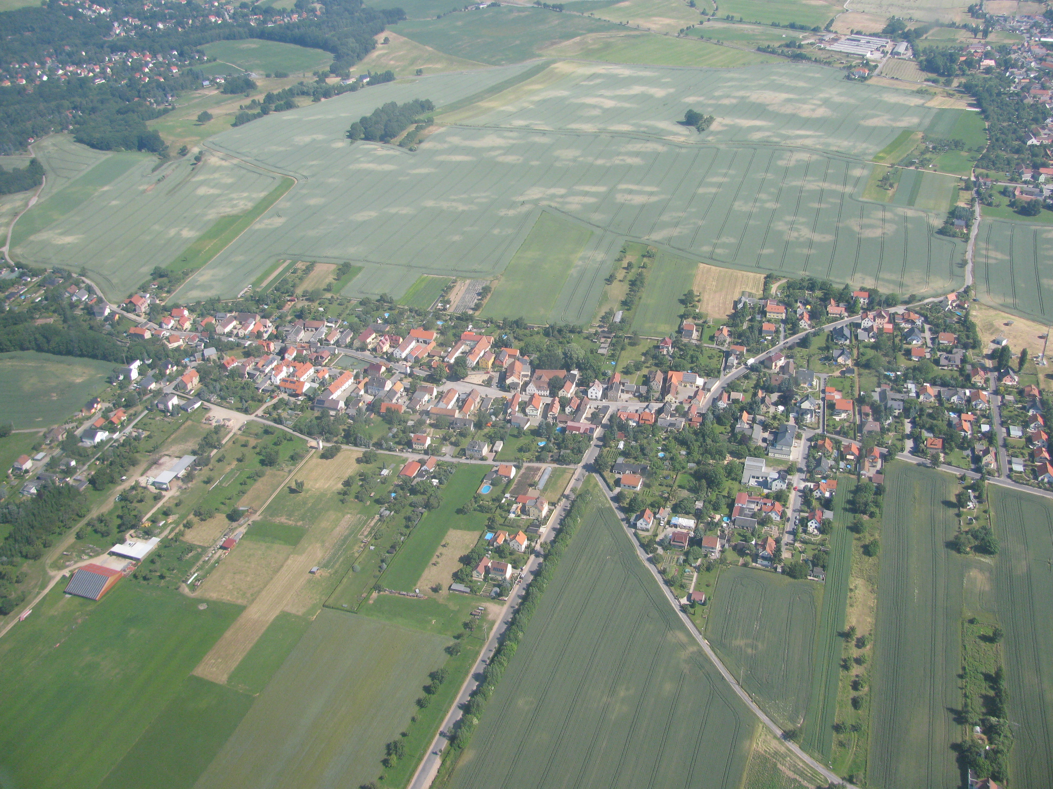 Luftbild Radebeul-Wahnsdorf